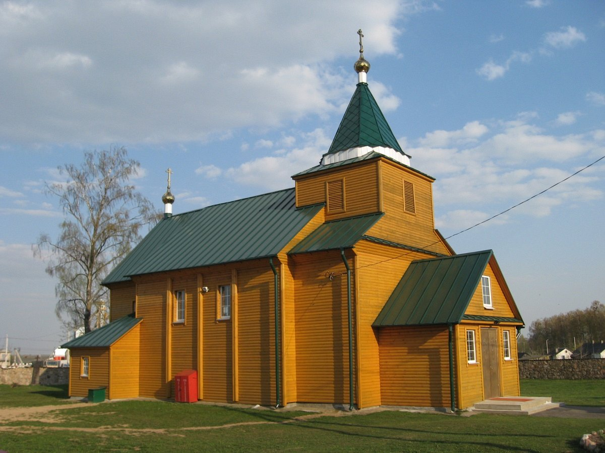 Княгінін. Драўляная царква